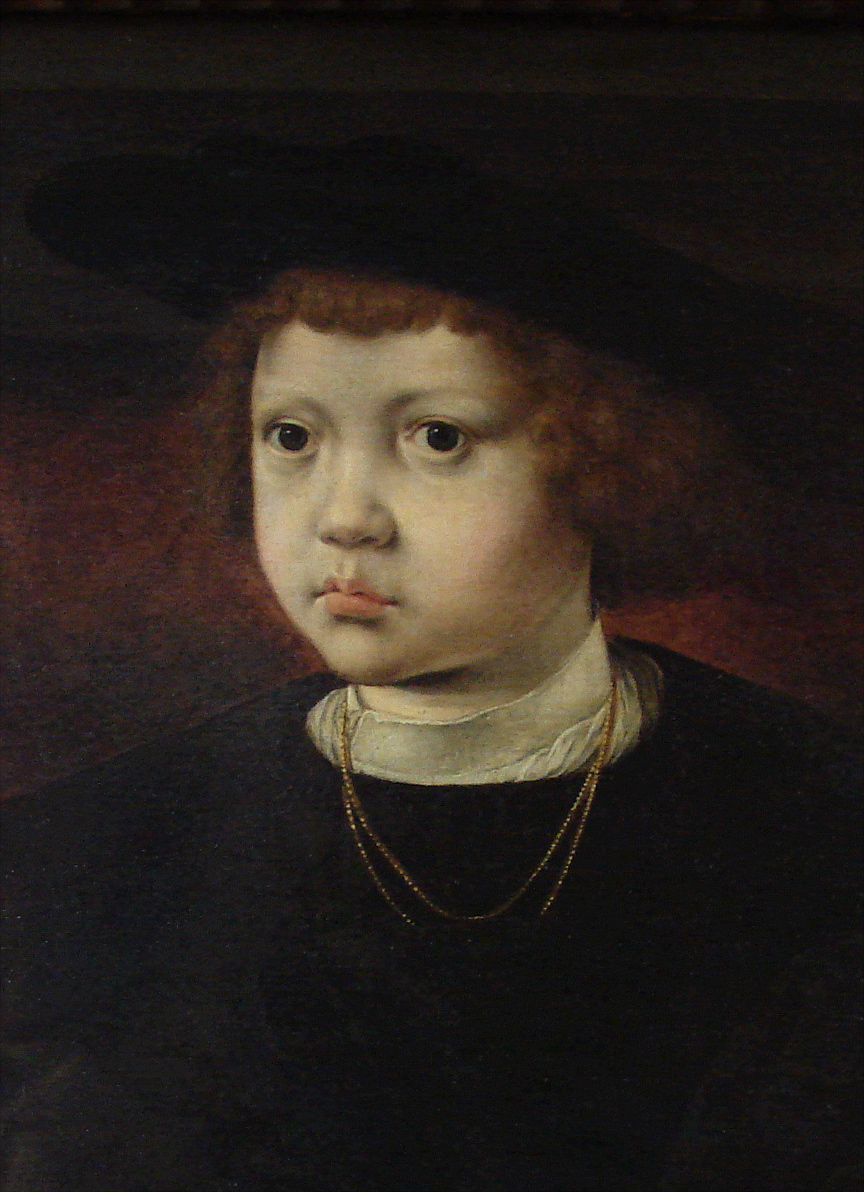 Prins Hans af Danmark, Norge og Sverige (1518-1532), Jan Gossaert (1478 (?)–1532)(udsnit)